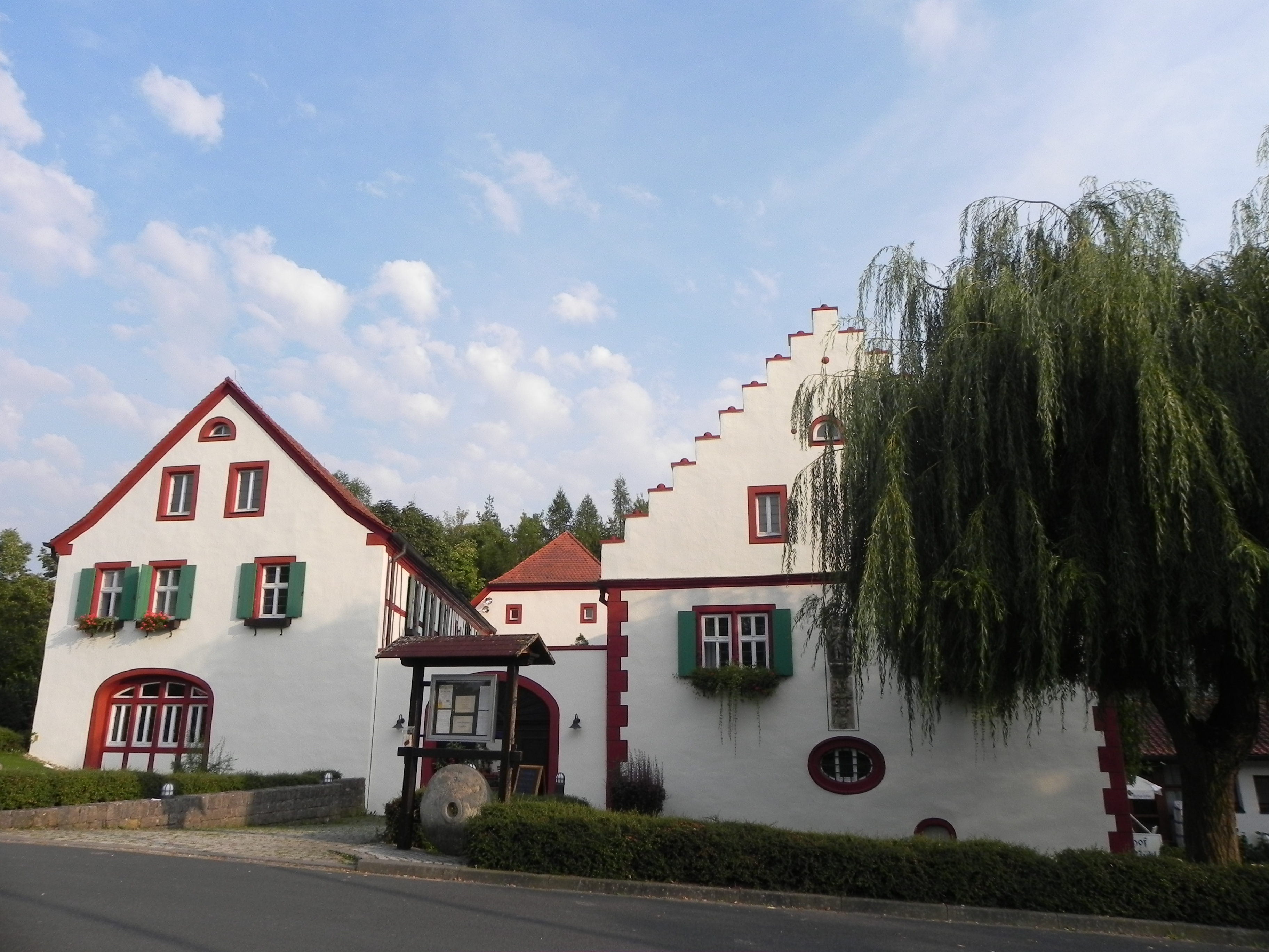 Weiße Mühle rechts: Satteldachbau mit Treppengiebel links: WirtschaftsgebäudeThis is a photograph of an architectural monument.